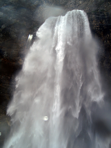 Reventon de agua en los Chorros del Río Mundo